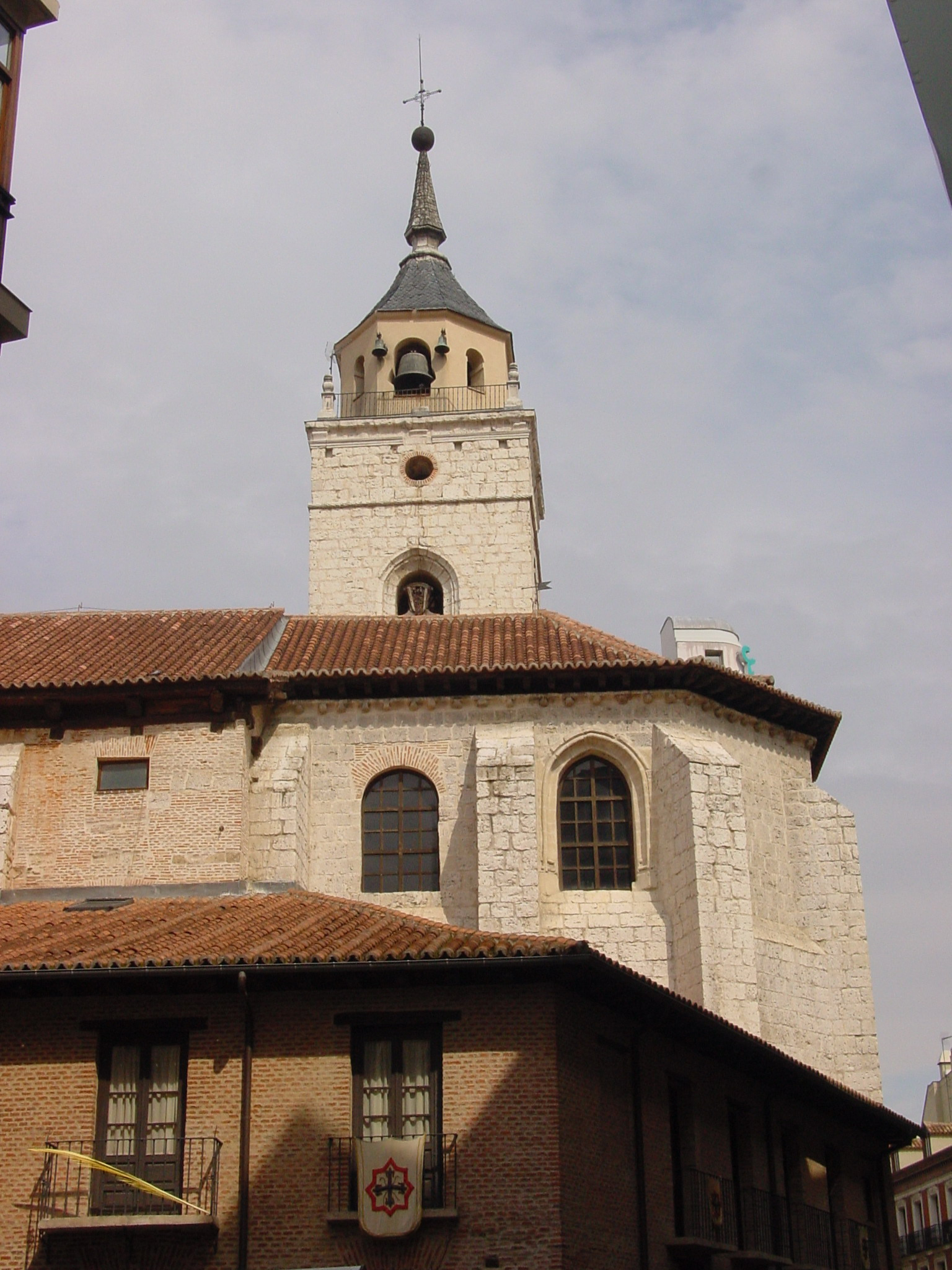 Valladolid, iglesia de Santiago, vista del ábside y la torre. Valladolid, Santiago church, view of apse and tower.